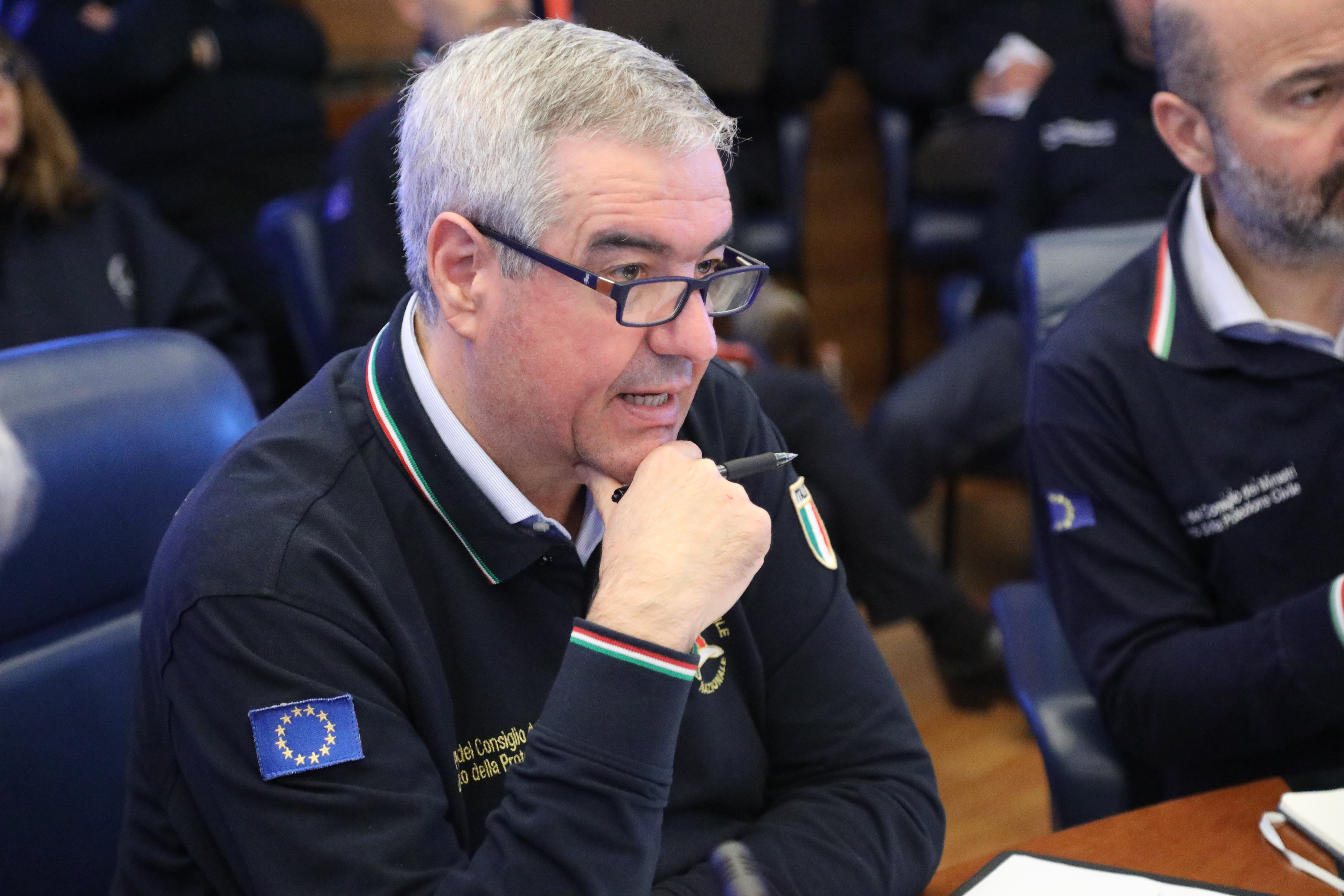 Roma, 1 febbraio 2020 – Il Comitato Operativo della Protezione Civile presieduto dal Capo Dipartimento Angelo Borrelli riunito per coordinare gli interventi finalizzati a fronteggiare l'emergenza coronavirus.